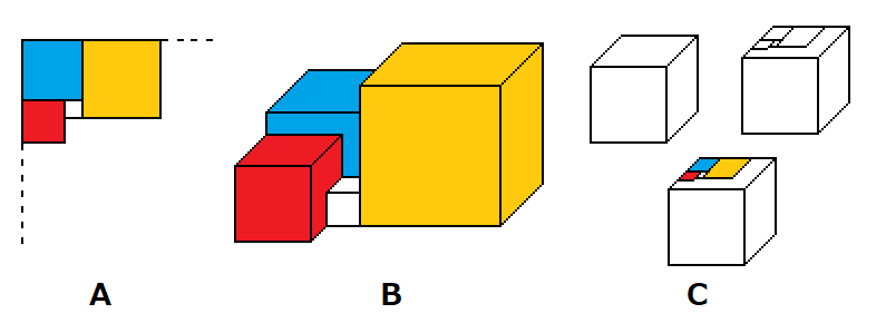 Ilustrasi pembuktian kubus sempurna dari masalah "cubing the cube" mustahil. A. persegi dan kubus terkecil tidak mungkin ada di sudut B. kubus terkecil akan dikelilingi kubus yang lebih besar dan lebih tinggi C. kubus di atas kubus terkecil lapisan pertama harus lebih kecil lagi